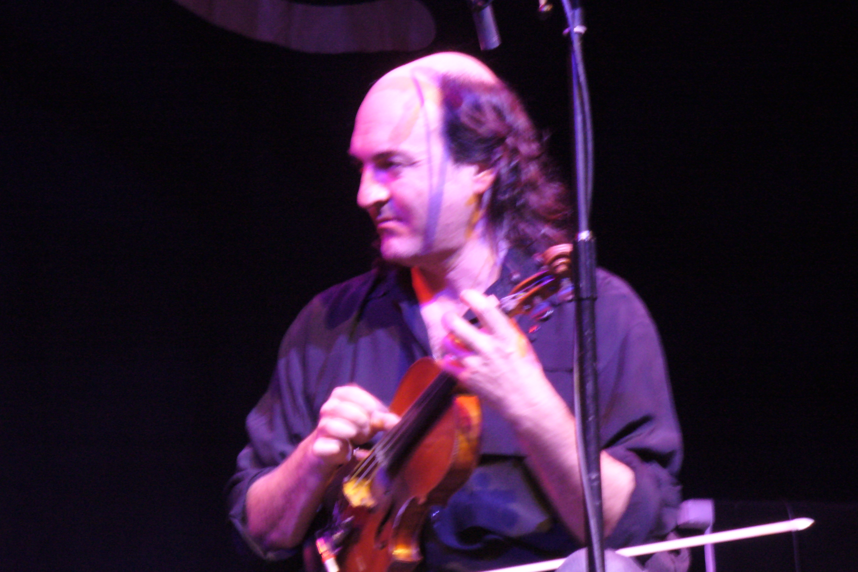 Le violoniste Jacky Molard du groupe Pennoù Skoulm au Celtic Connections de Glasgow en 2010.